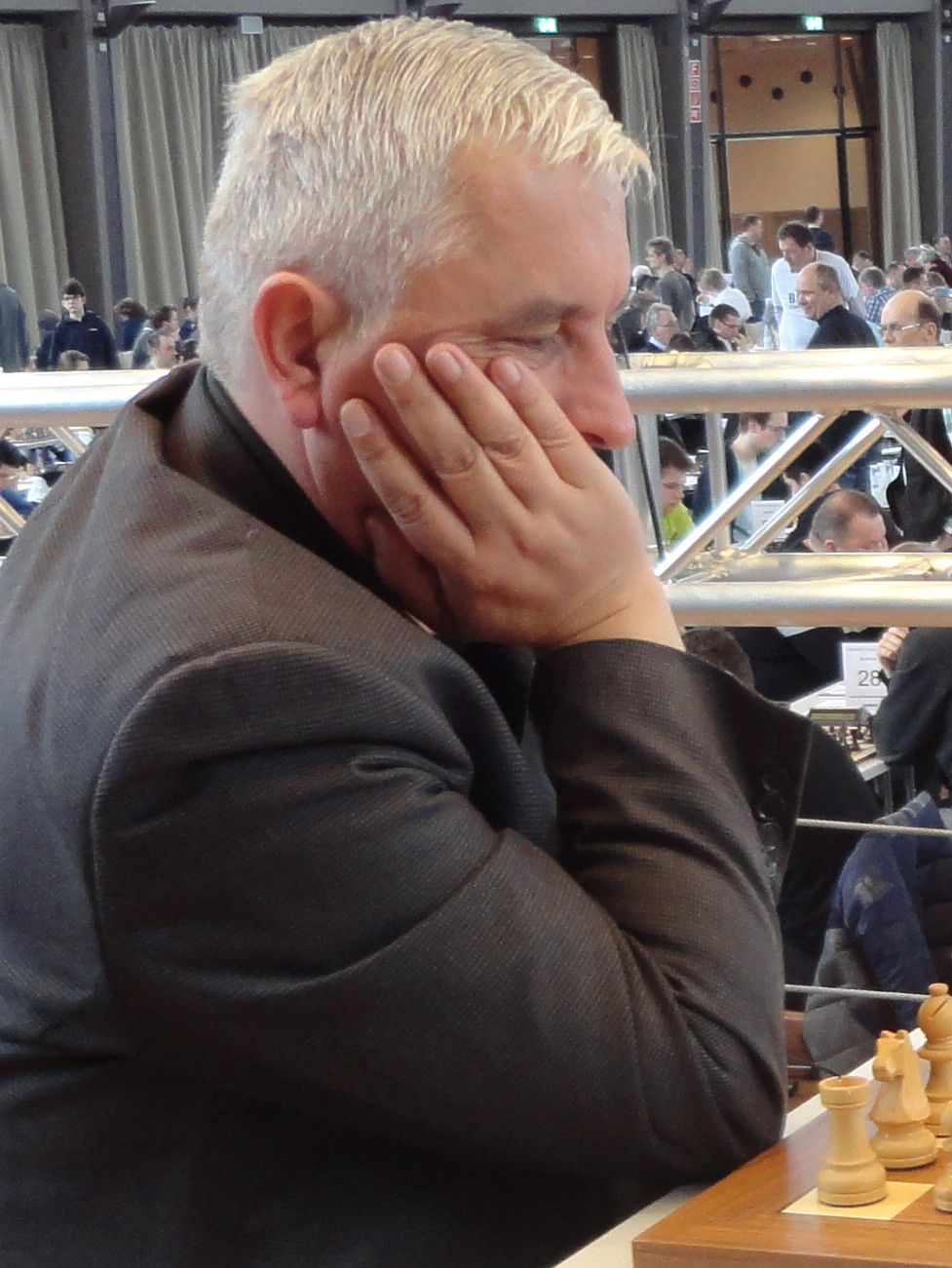 Kozul Zdenko, Grenke Chess Open 2016 in Karlsruhe.